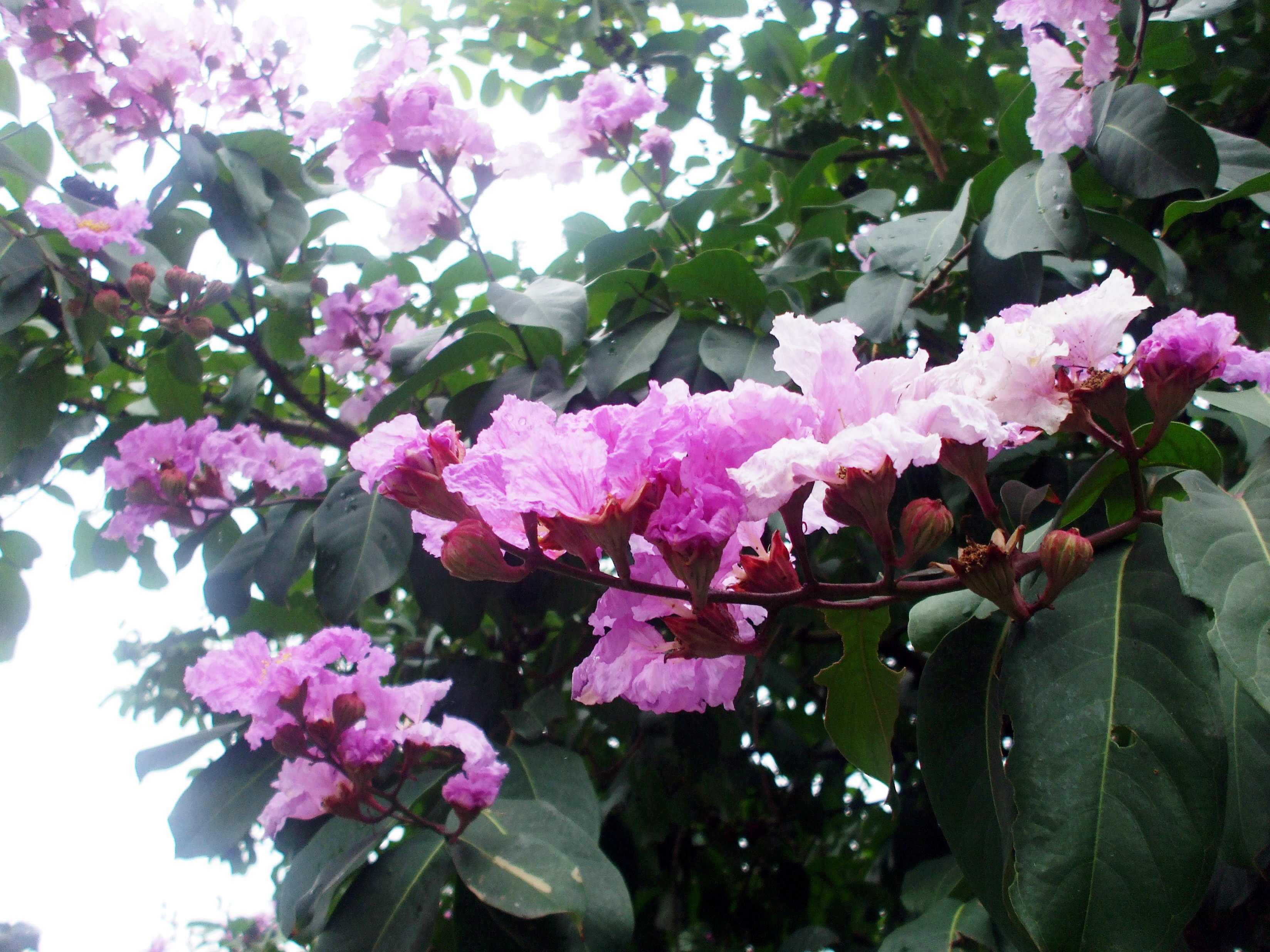 Bằng lăng tím tại đền vua Hùng ở Phú Thọ (Việt Nam)